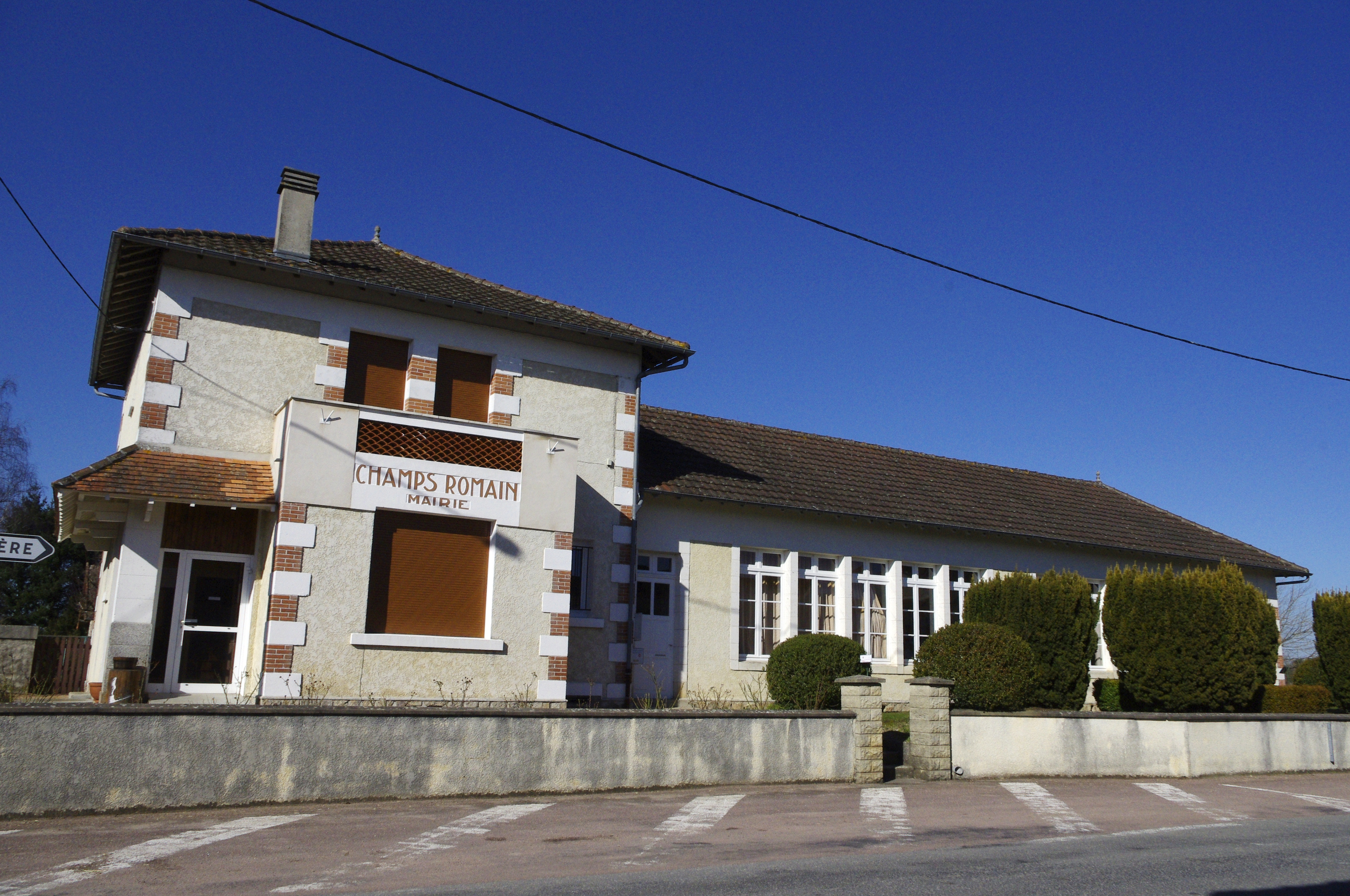 Champs-Romain, Dordogne, mairie